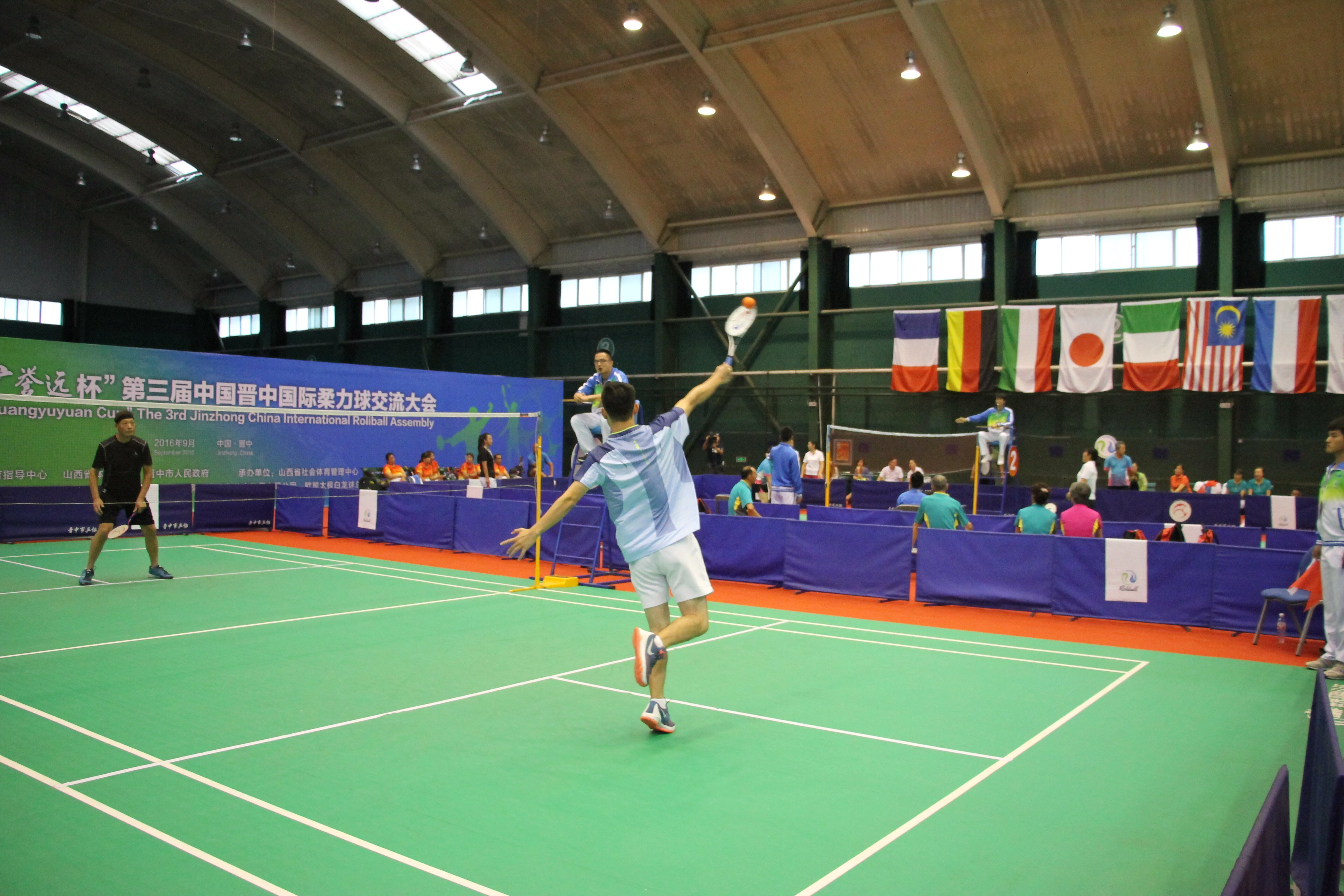 Мужская одиночная игра мультиплей на 3-й всемирной Ассамблее по ролиболу в Китае